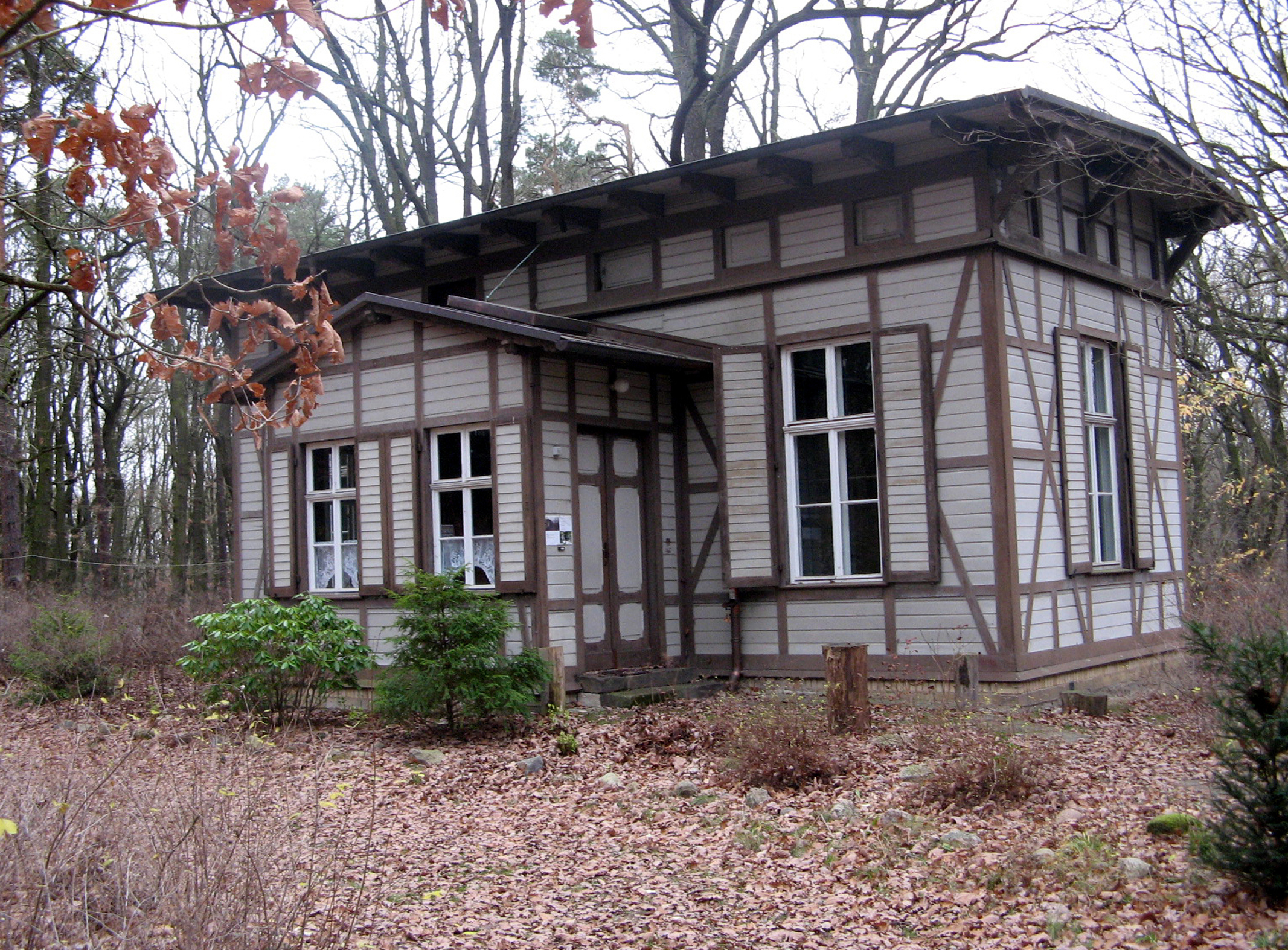 Das Waldhaus auf dem Telegrafenberg (Potsdam), eine eisenfreie Holzkonstruktion mit einem Sockel aus äußerst schwer magnetisierbarem Trias-Sandstein, wurde am 1. Januar 1897 als Absoluthaus zur Messung der absoluten Intensität des Erdmagnetfeldes in Betrieb genommen. Es gehörte zum Geomagnetischen Observatorium Potsdam, das der Geophysiker Adolf Schmidt von 1902 bis 1928 leitete. Heute dient das Waldhaus der Palöomagnetik, deren magnetische Messungen zur Altersbestimmung von Gesteinen genutzt werden.